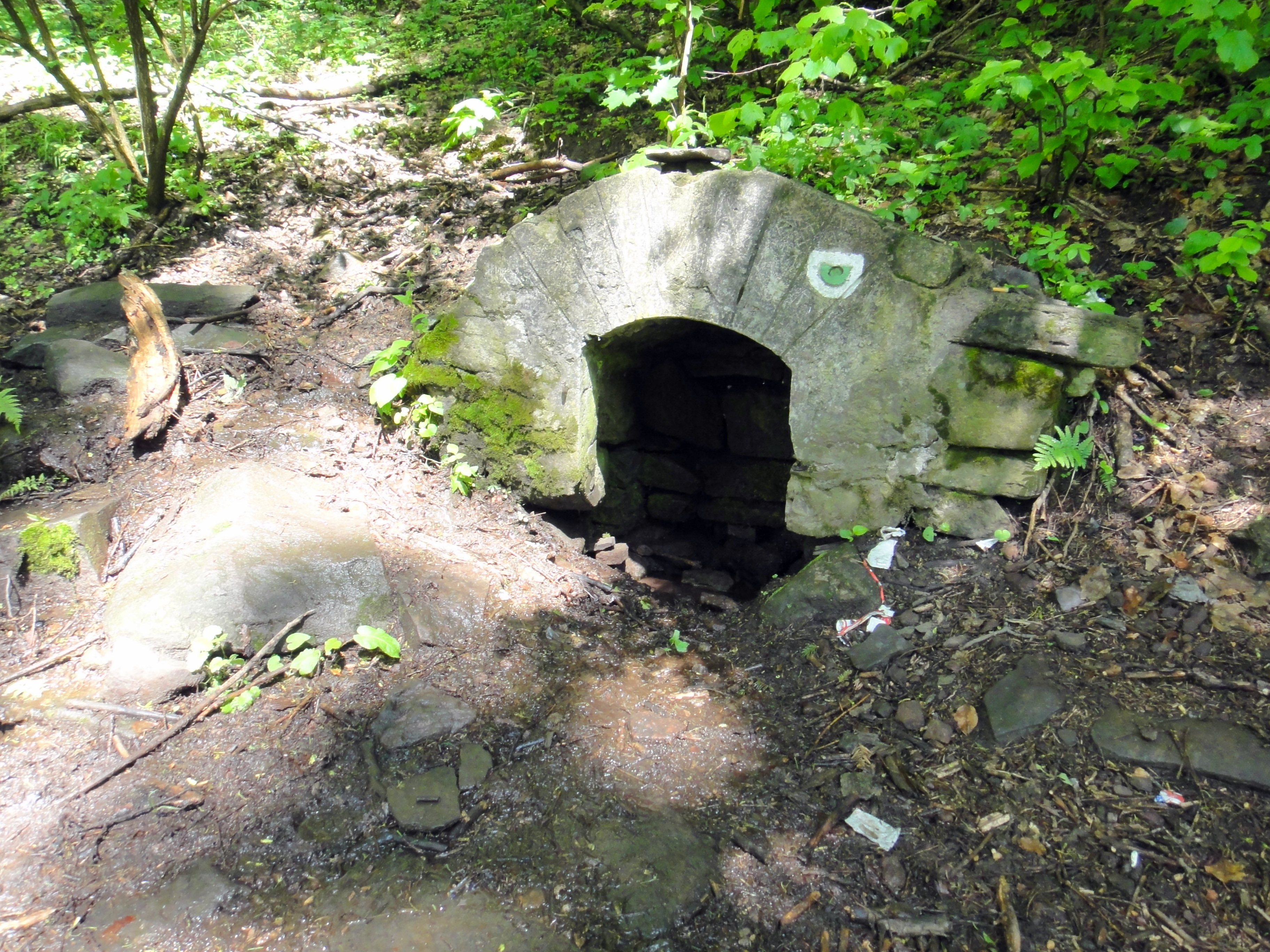 Prameň Klastavského potoka